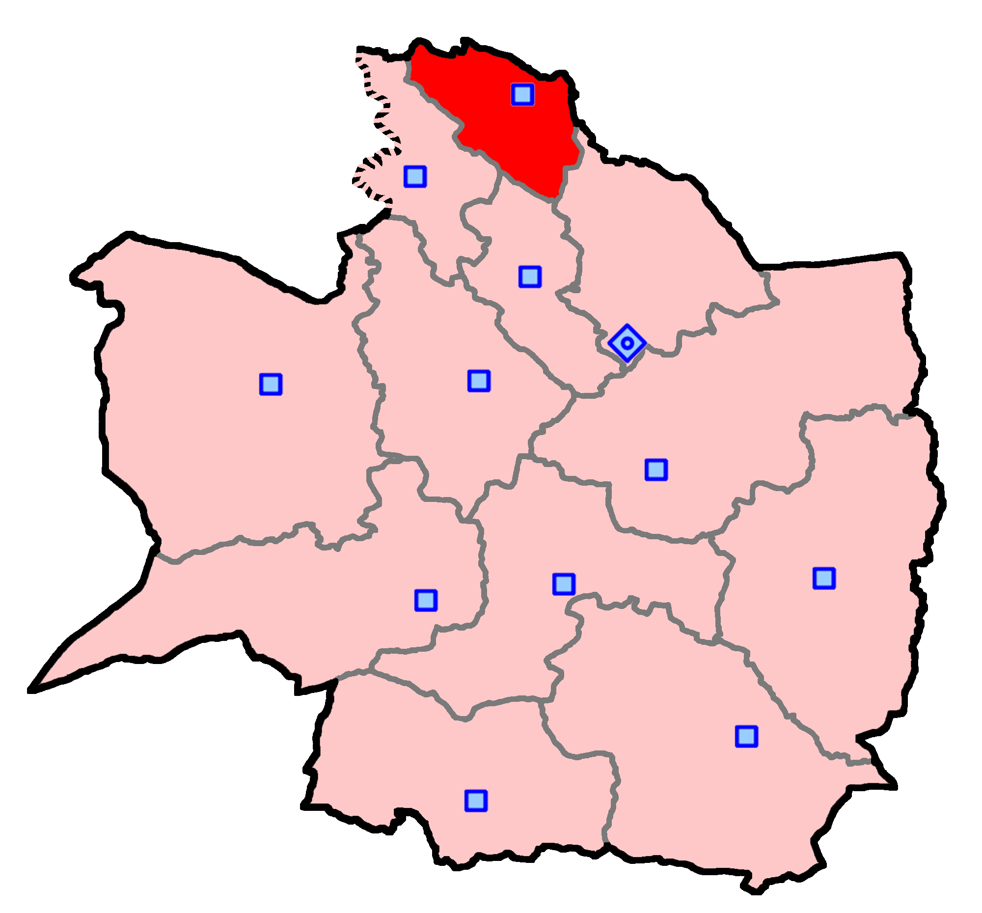 حوزهٔ انتخاباتی درگز برای انتخابات مجلس شورای اسلامی